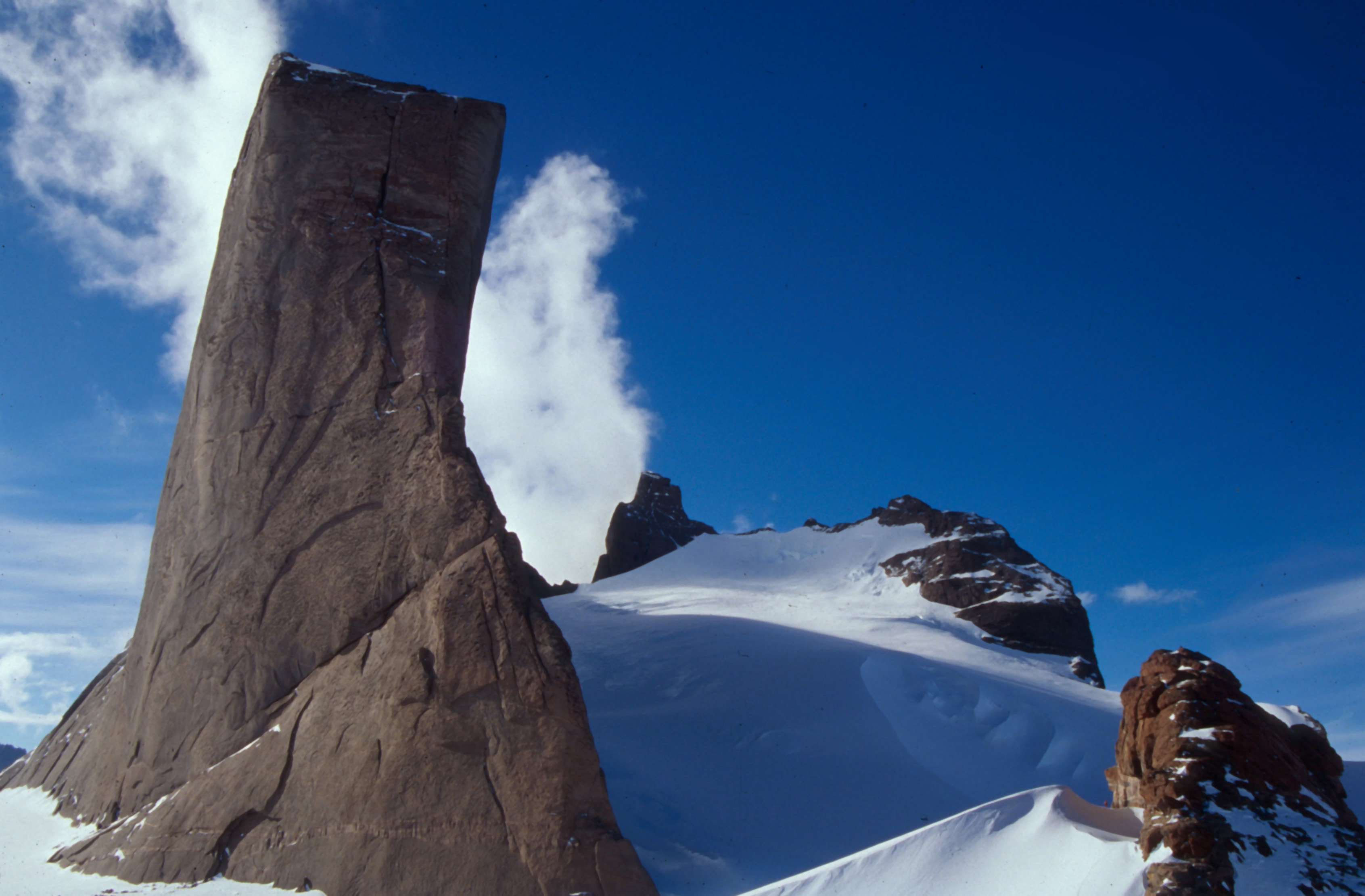 Die Holtanna (2650 m) in den südlichen Drygalskibergen, Blick von Süden.